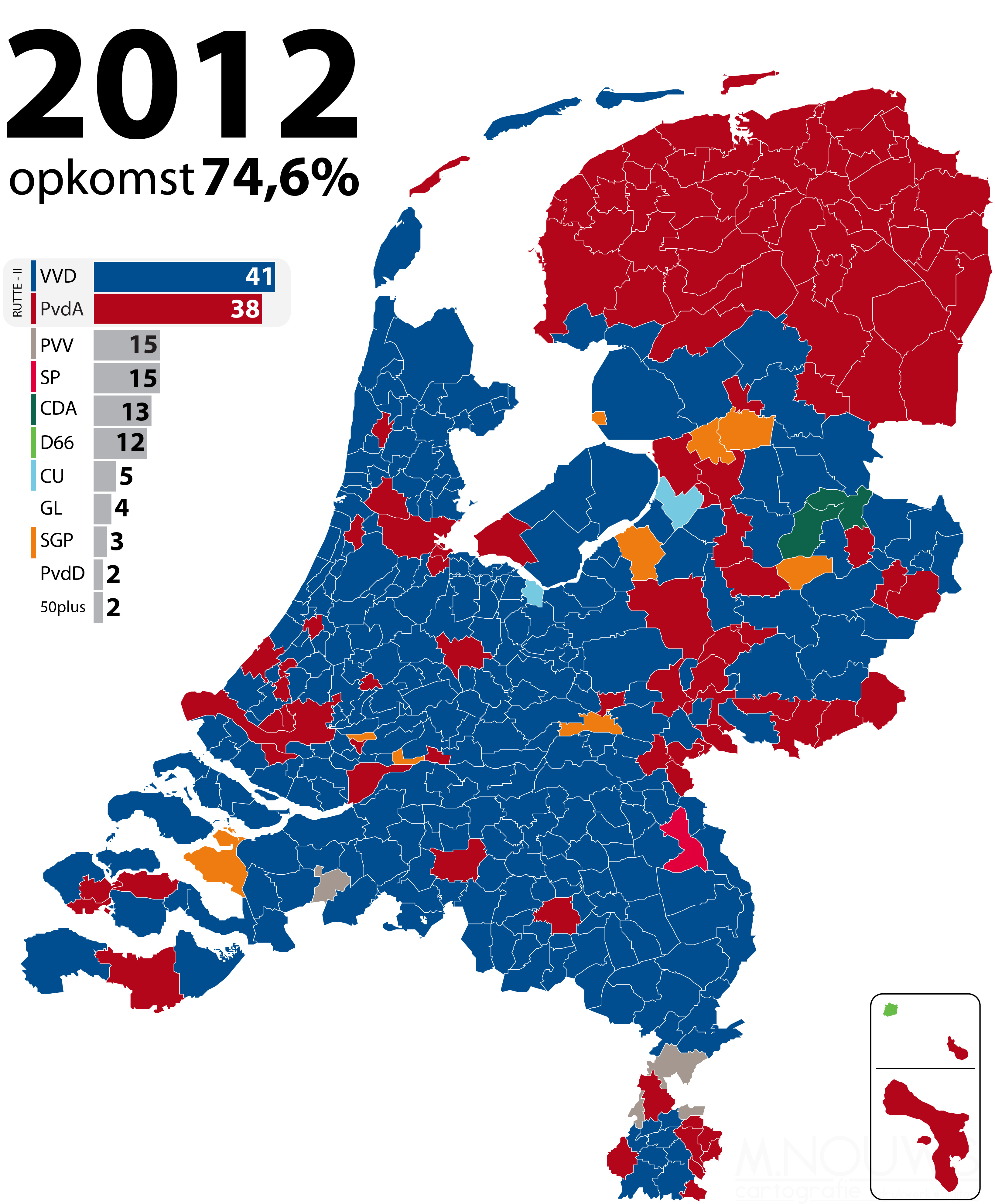 Grootste politieke partij per gemeente, zetelverdeling en kabinetscoalitie bij Tweede Kamerverkiezingen 2012